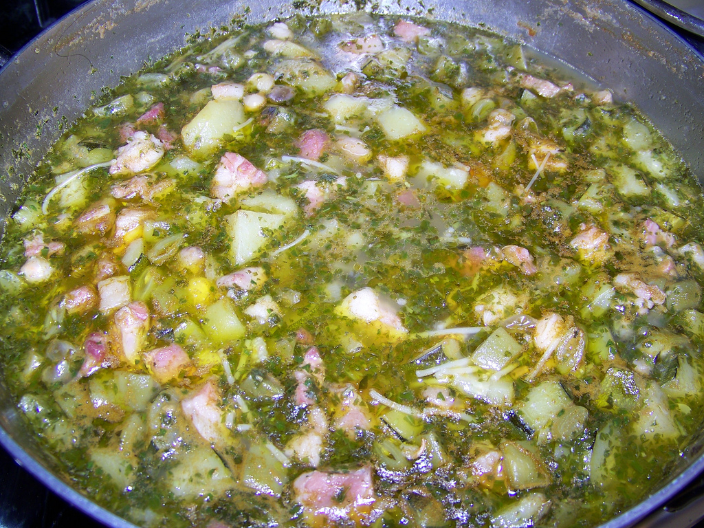 C'est prêt à être mangé!